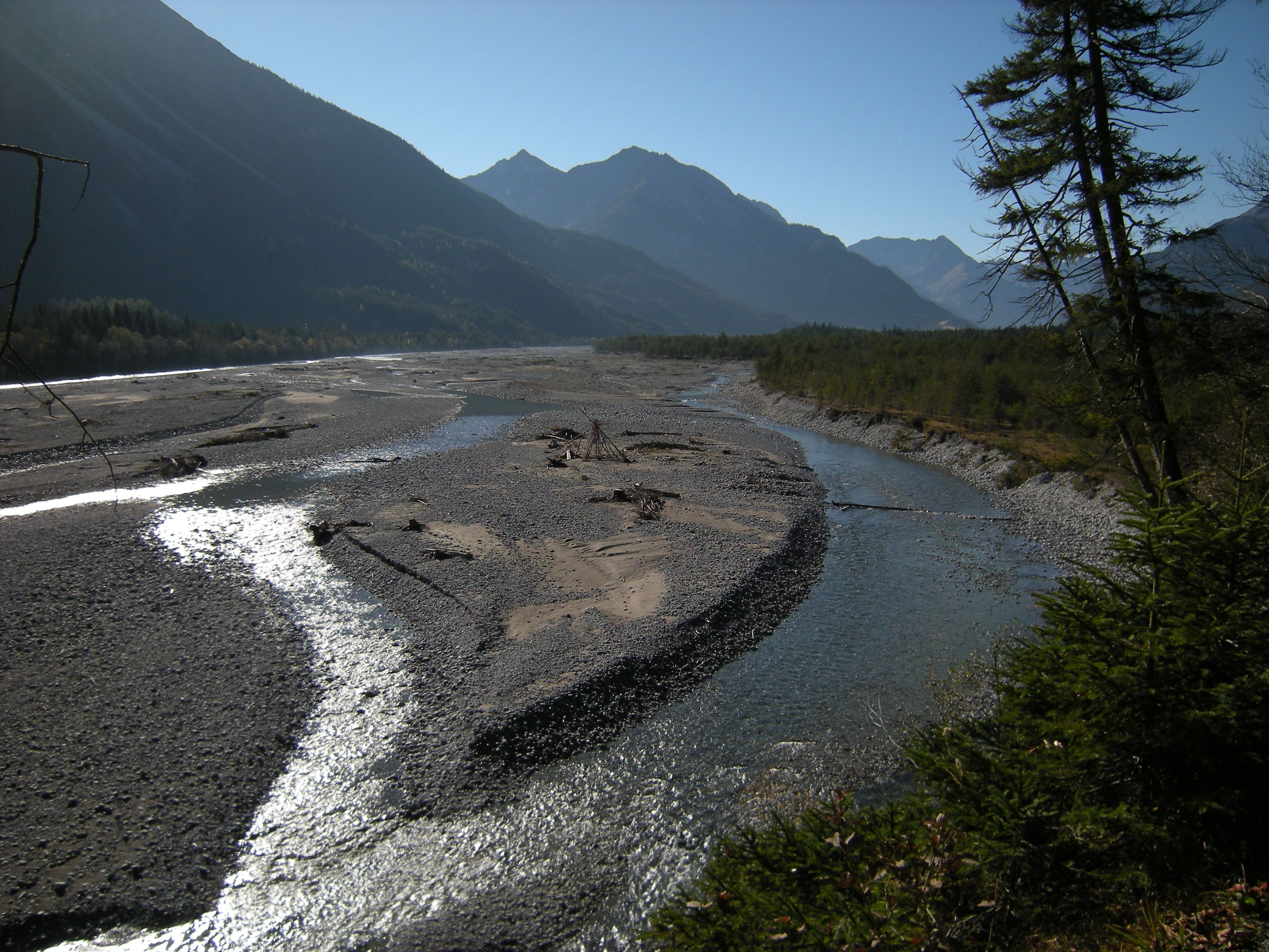 Kiesbank im Wildfluss Lech bei Forchach